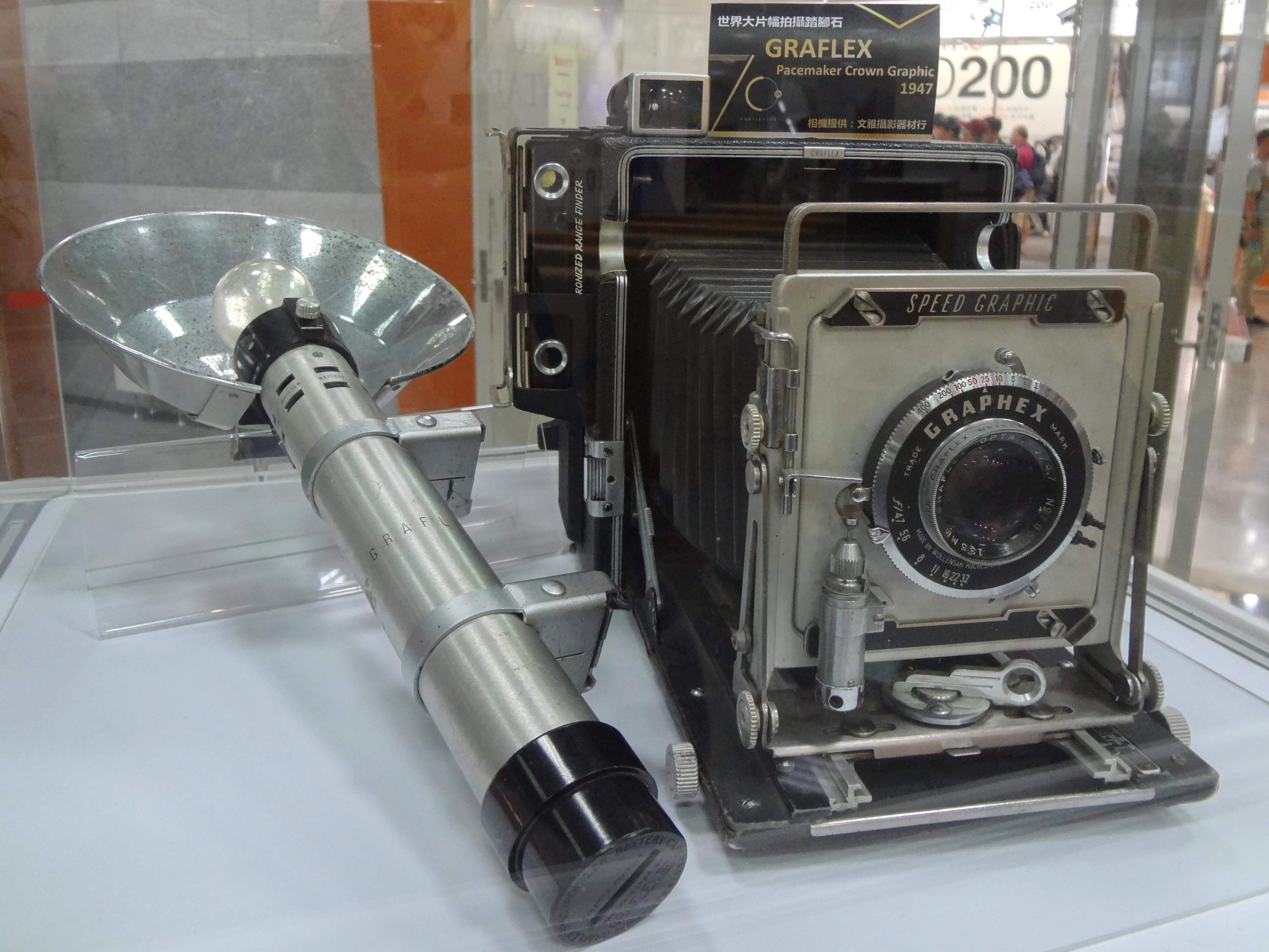 2018台北國際攝影器材暨影像應用大展，Graflex Pacemaker Crown Graphic展示品。